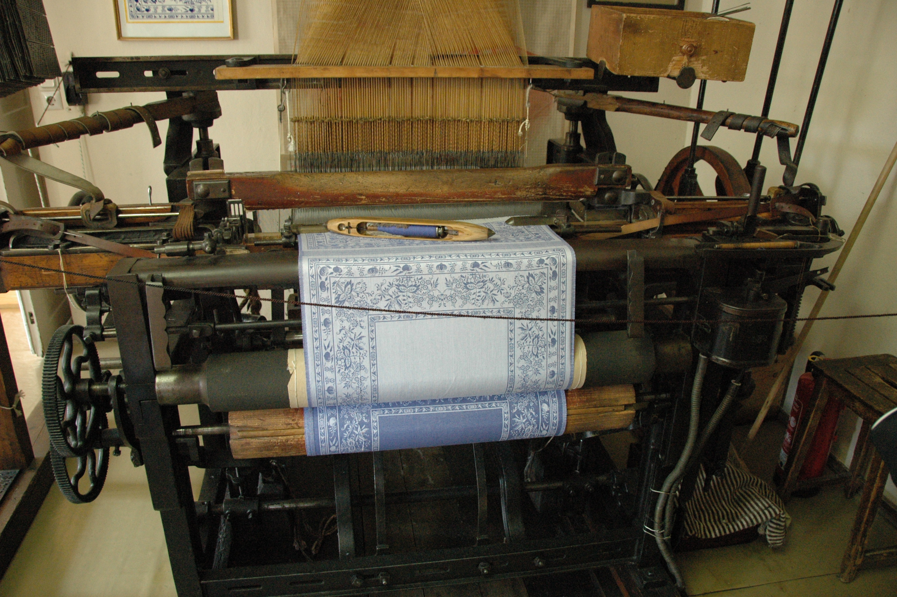 Maschine im Deutschen Damast- und Frottiermuseum in sächsischen Großschönau.